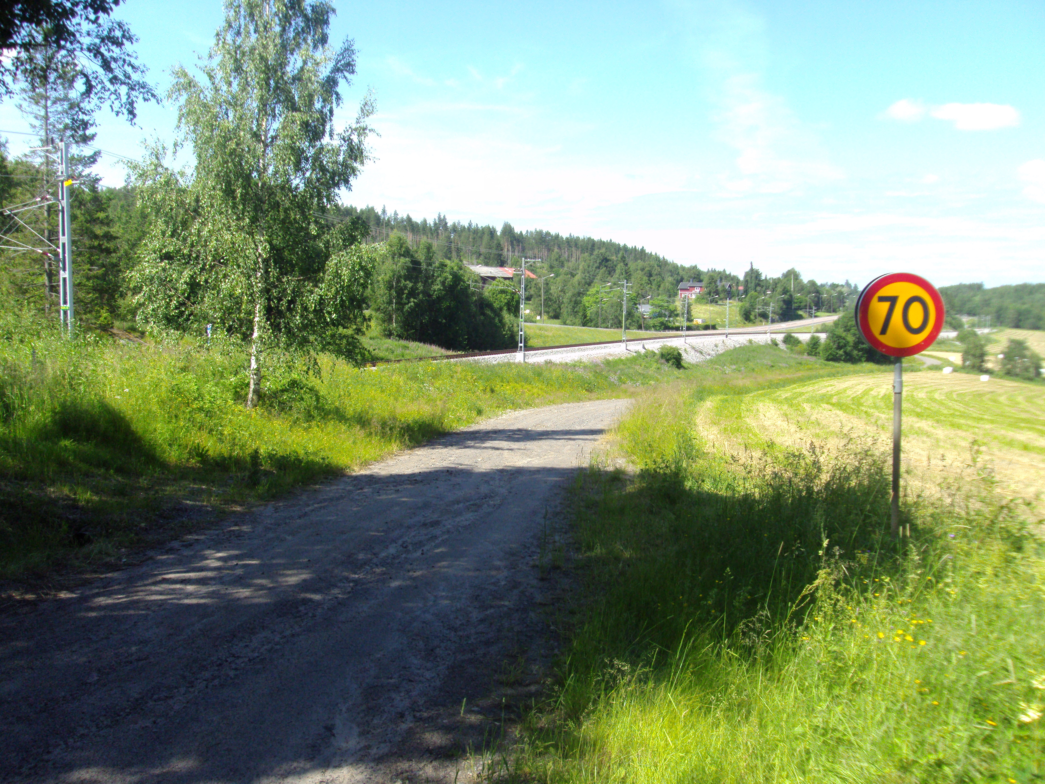 Strömnäs i juli 2011. Bilden tagen från samma plats som det berömda ådalenfotot